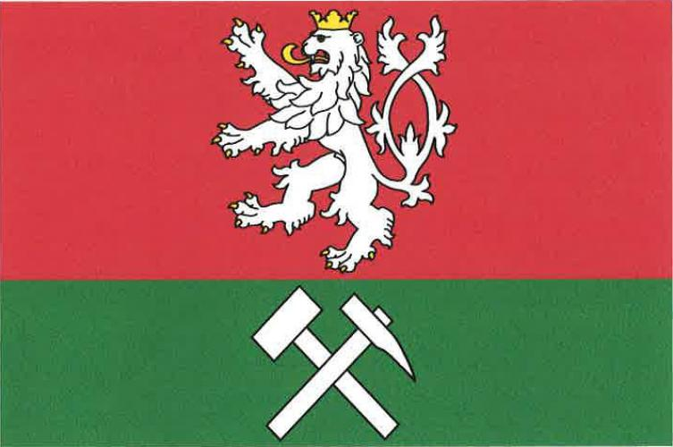 Česká Bělá vlajka